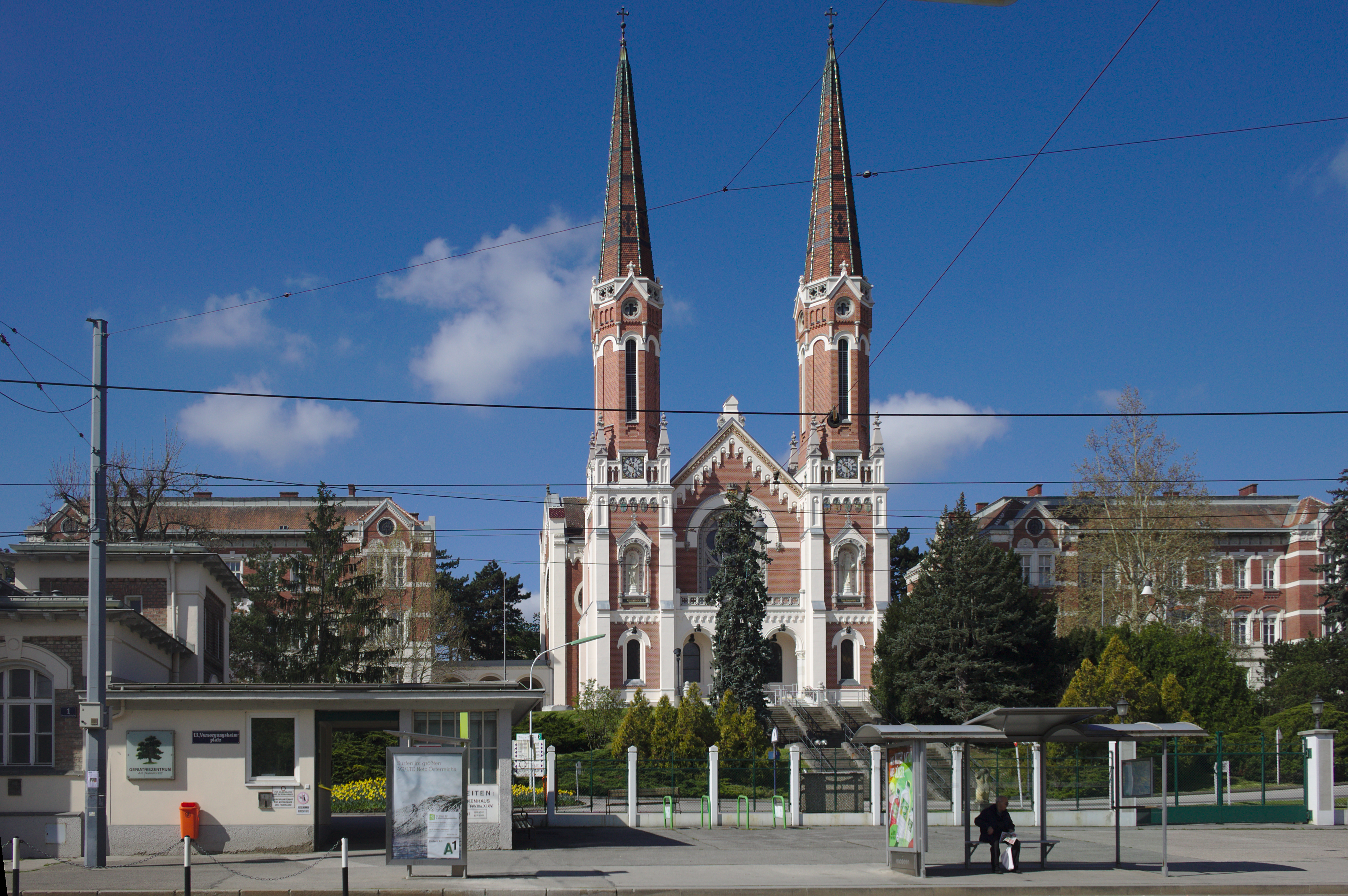 Gesamtanlage, Pflegeheim der Stadt Wien Lainz